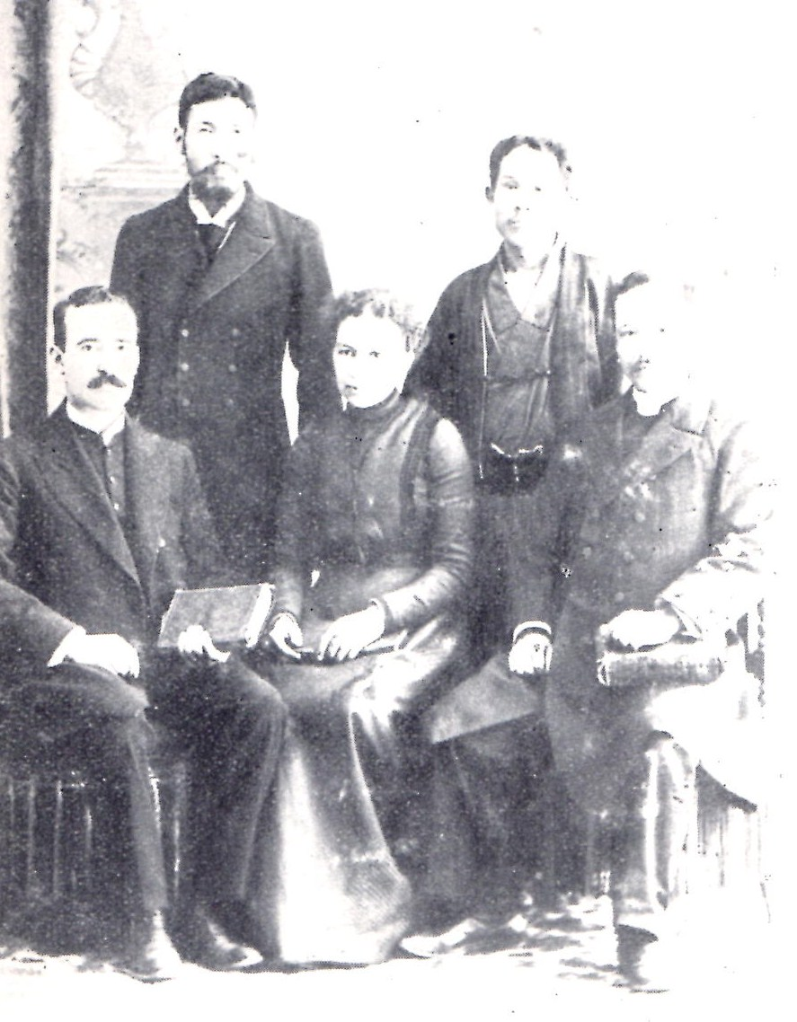 東洋宣教会の創立時の聖書学院の教師陣